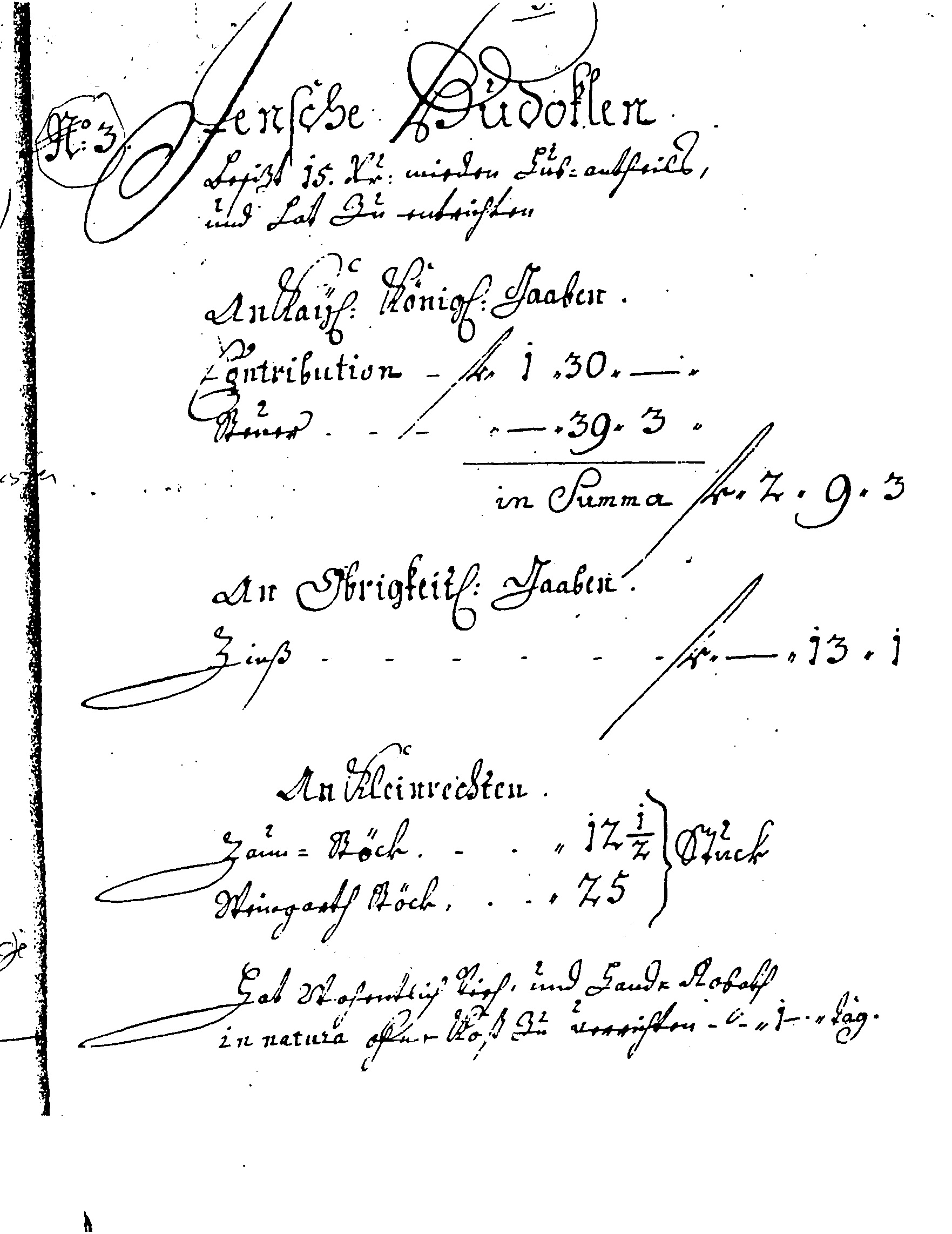 Urbar gospostva Kostanjevica, druga polovica 18.stoletja, vložek.